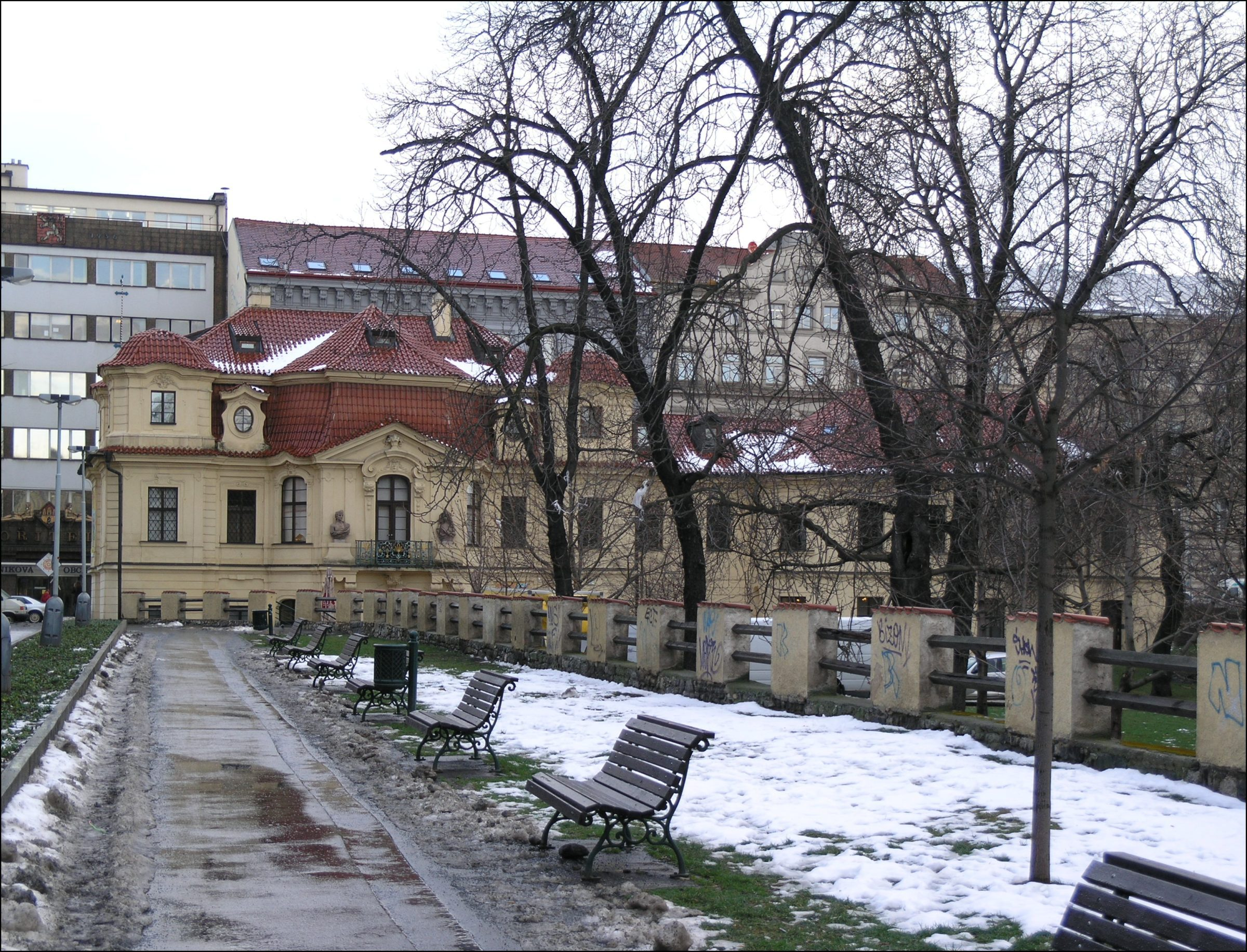 vila Portheimka